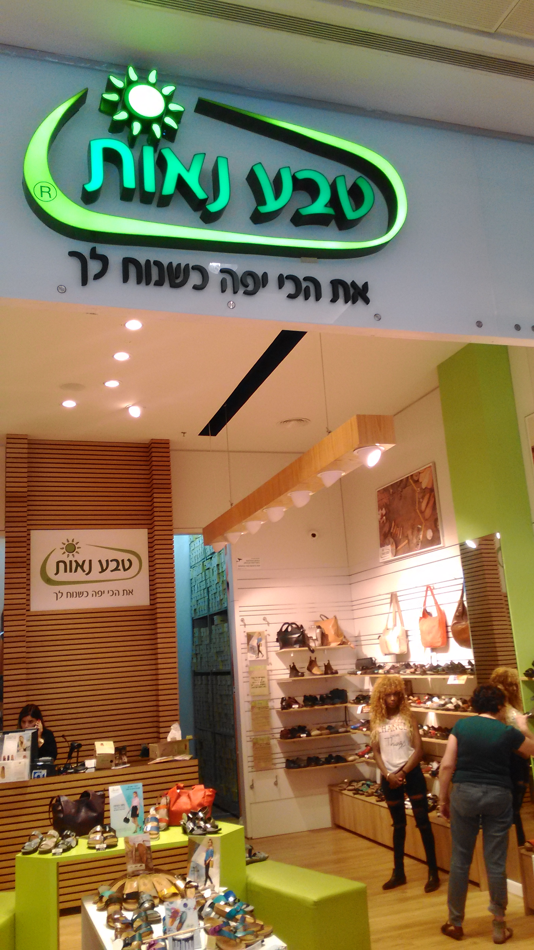 טבע נאות, סניף הקריון